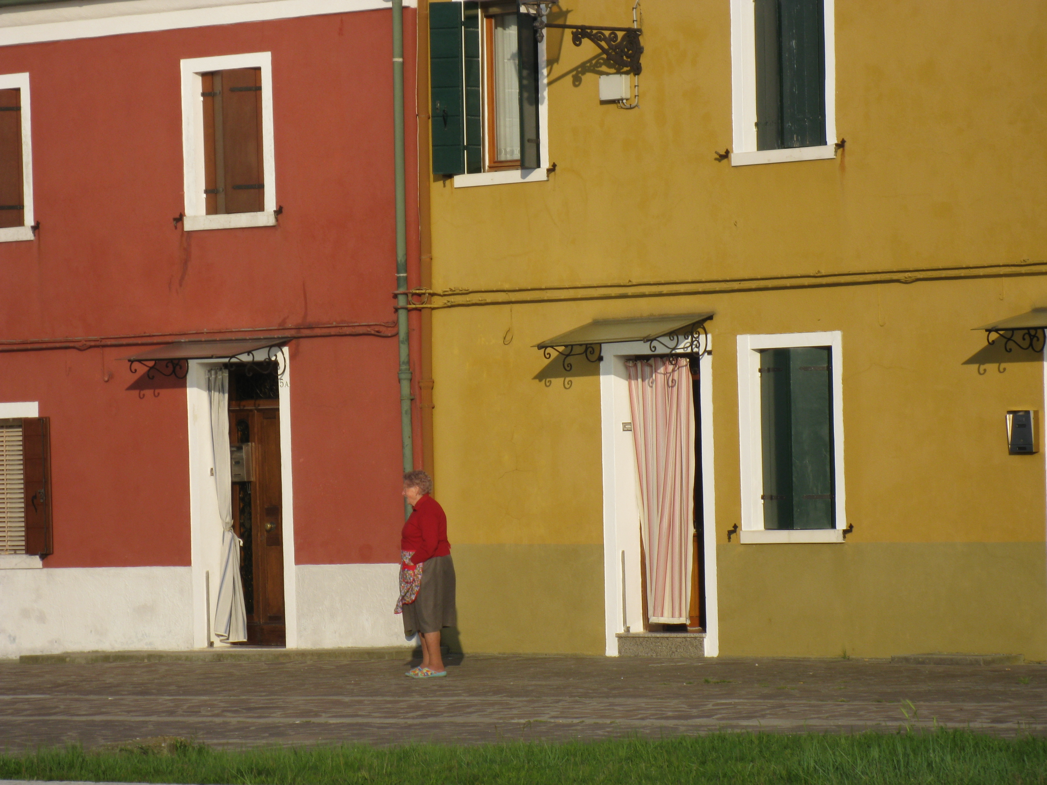 Mazzorbo מצורבו